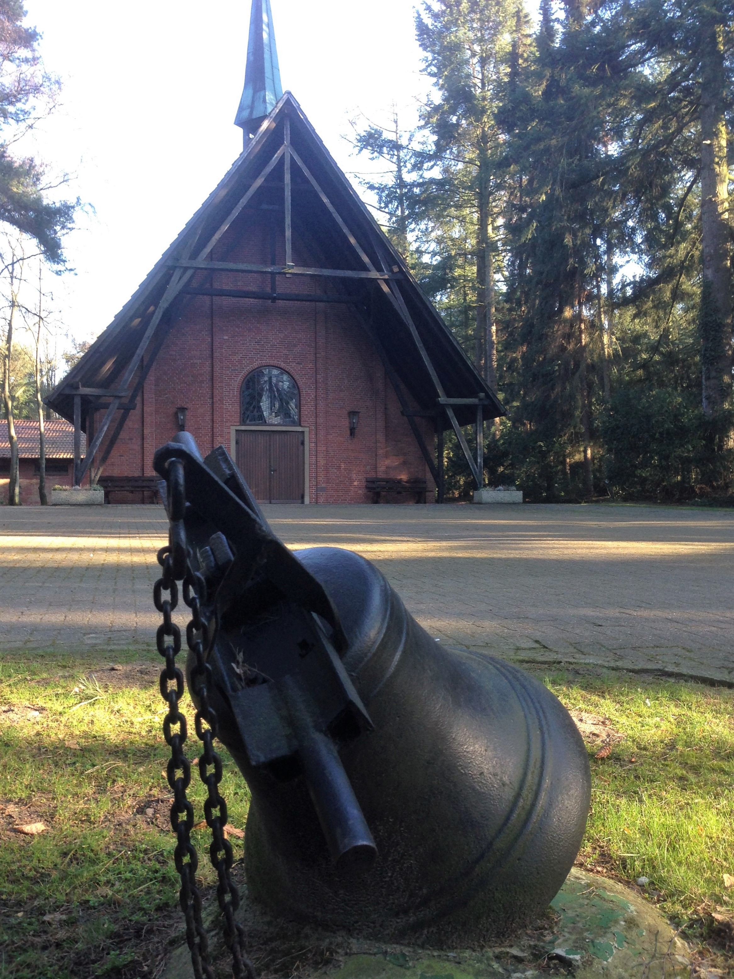 Glocke vor der Auferstehungskirche auf dem evangelischen Waldfriedhof in Vechta